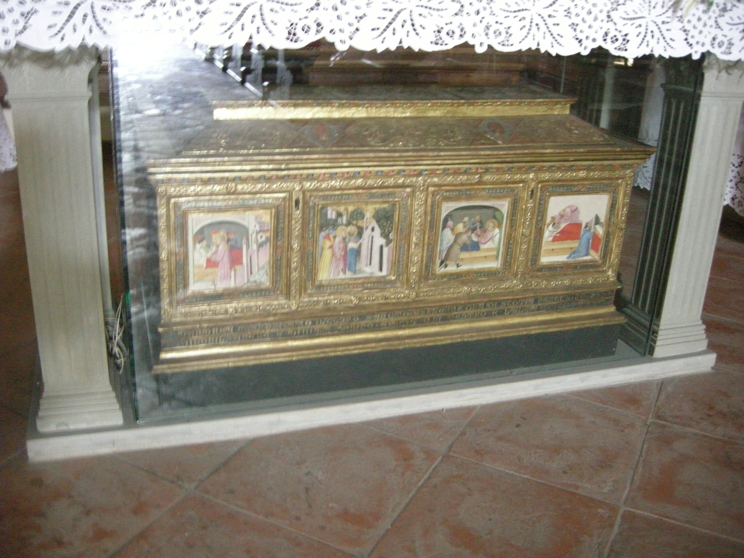 San martino a mensola, interno, cassa di s. andrea di scozia